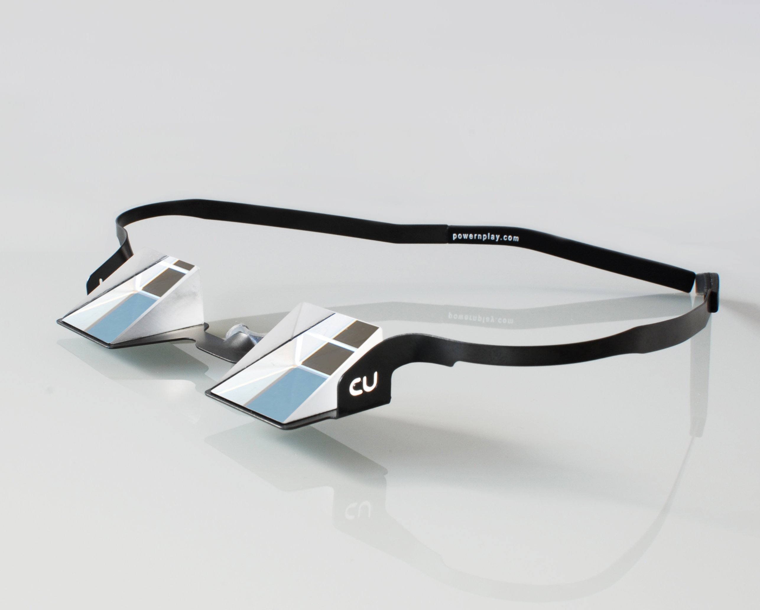 Lunettes d´assurage de 2007